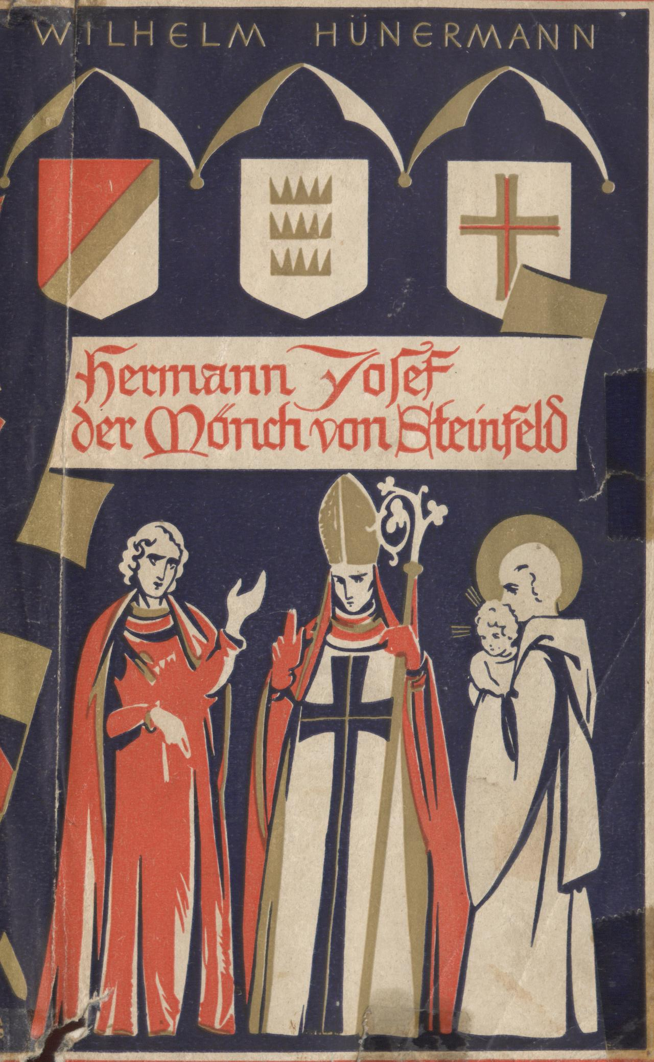 Wilhelm Hünermann, Priester und Buchautor, Bucheinband